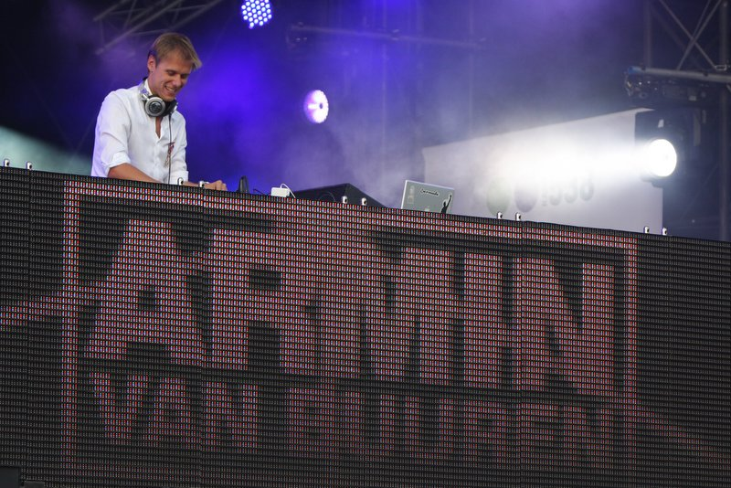 Nederlandse DJ